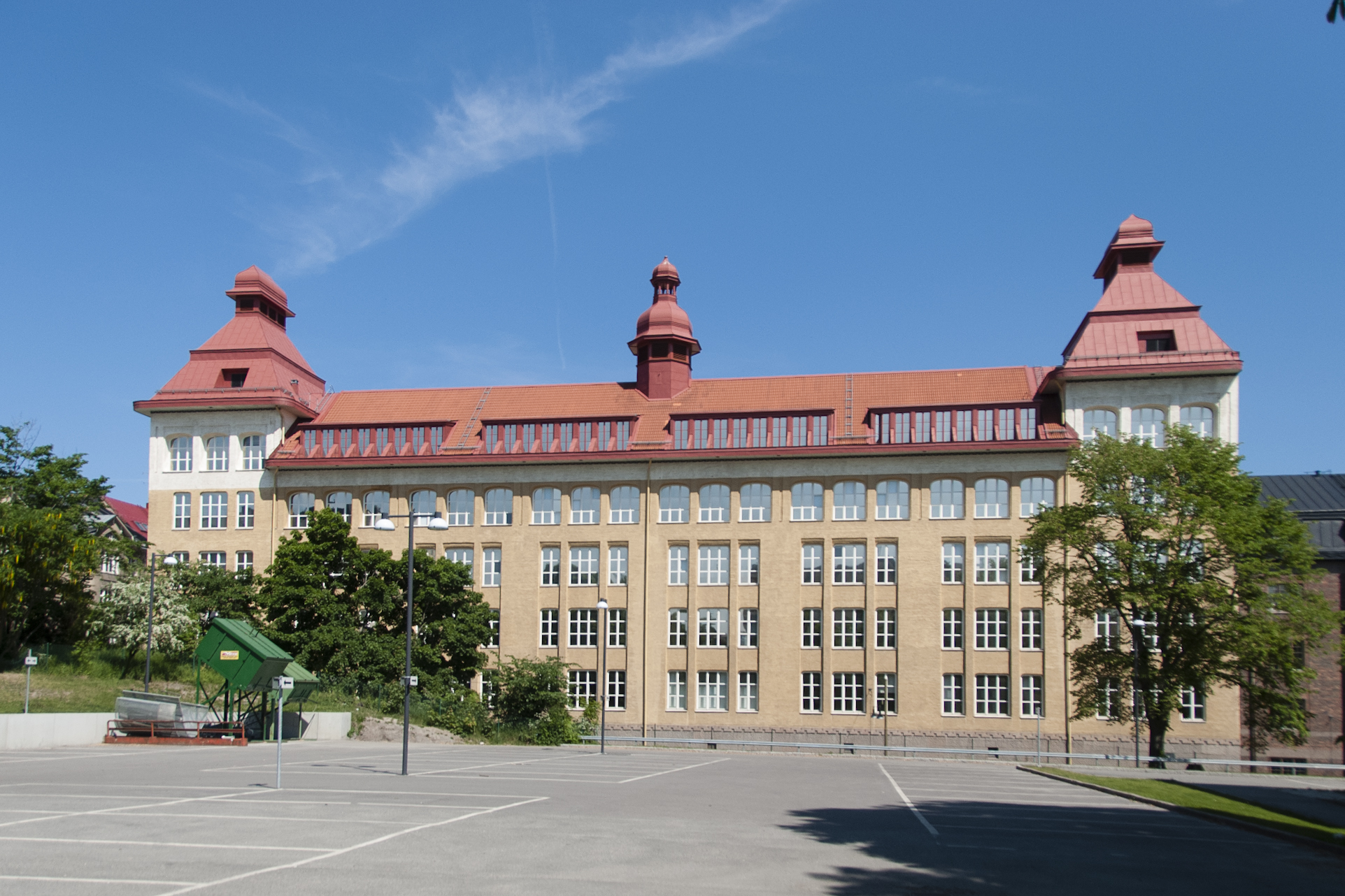 Adolf Fredriks skola